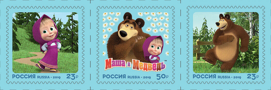 № 2557-2559. Современный российский кинематограф. Мультфильм «Маша и Медведь»